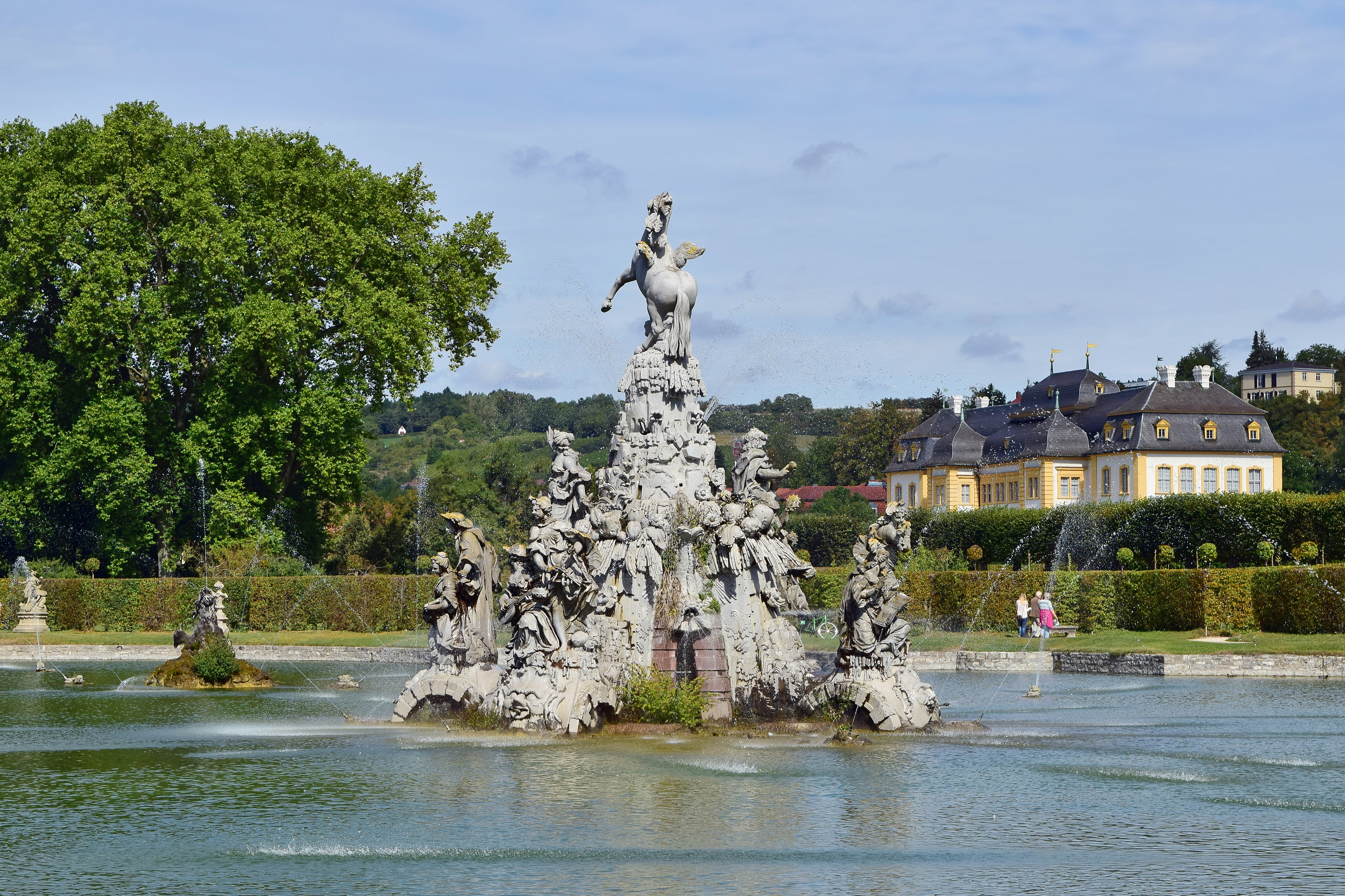 Der Hofgarten des Schlosses Veitshöchheim.nahm seinen Anfang im 17. Jahrhundert als Fasanerie und wurde im 18. Jahrhundert weiter ausgestaltet und erweitert. Die Sandsteinfiguren stammen von Johann Wolfgang von der Auwera, Ferdinand Tietz und Johann Peter Wagner.This is a photograph of an architectural monument.